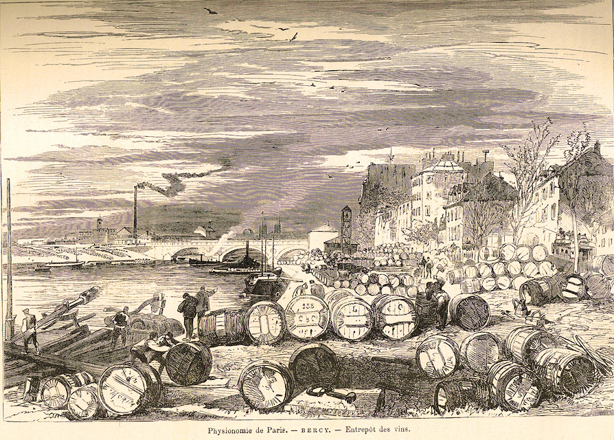 Gravure représentant l'entrepôt de Bercy en 1856